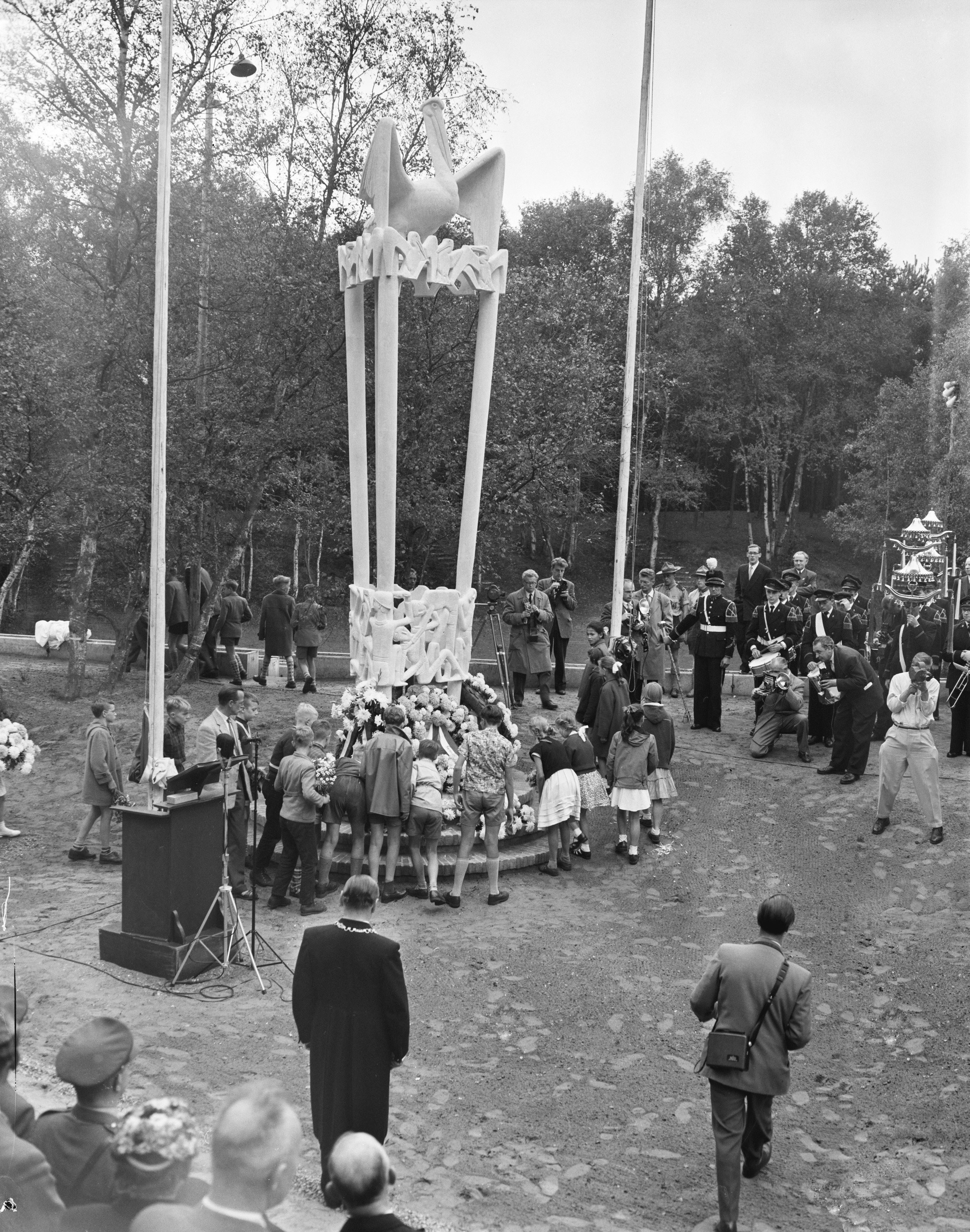 Collectie / Archief : Fotocollectie Anefo Reportage / Serie : [ onbekend ] Beschrijving : Onthulling te Best van het oorlogsmonument voor de Amerikaanse soldaat Joe Mann. Zittend de ouders van de soldaat Annotatie : Het monument is een ontwerp van A. Berntsen Datum : 16 september 1956 Locatie : Best, Noord-Brabant Trefwoorden : onthullingen, oorlogsmonumenten Fotograaf : Rossem, Wim van / Anefo, [onbekend] Auteursrechthebbende : Nationaal Archief Materiaalsoort : Negatief (zwart/wit) Nummer archiefinventaris : bekijk toegang 2.24.01.04 Bestanddeelnummer : 908-0070